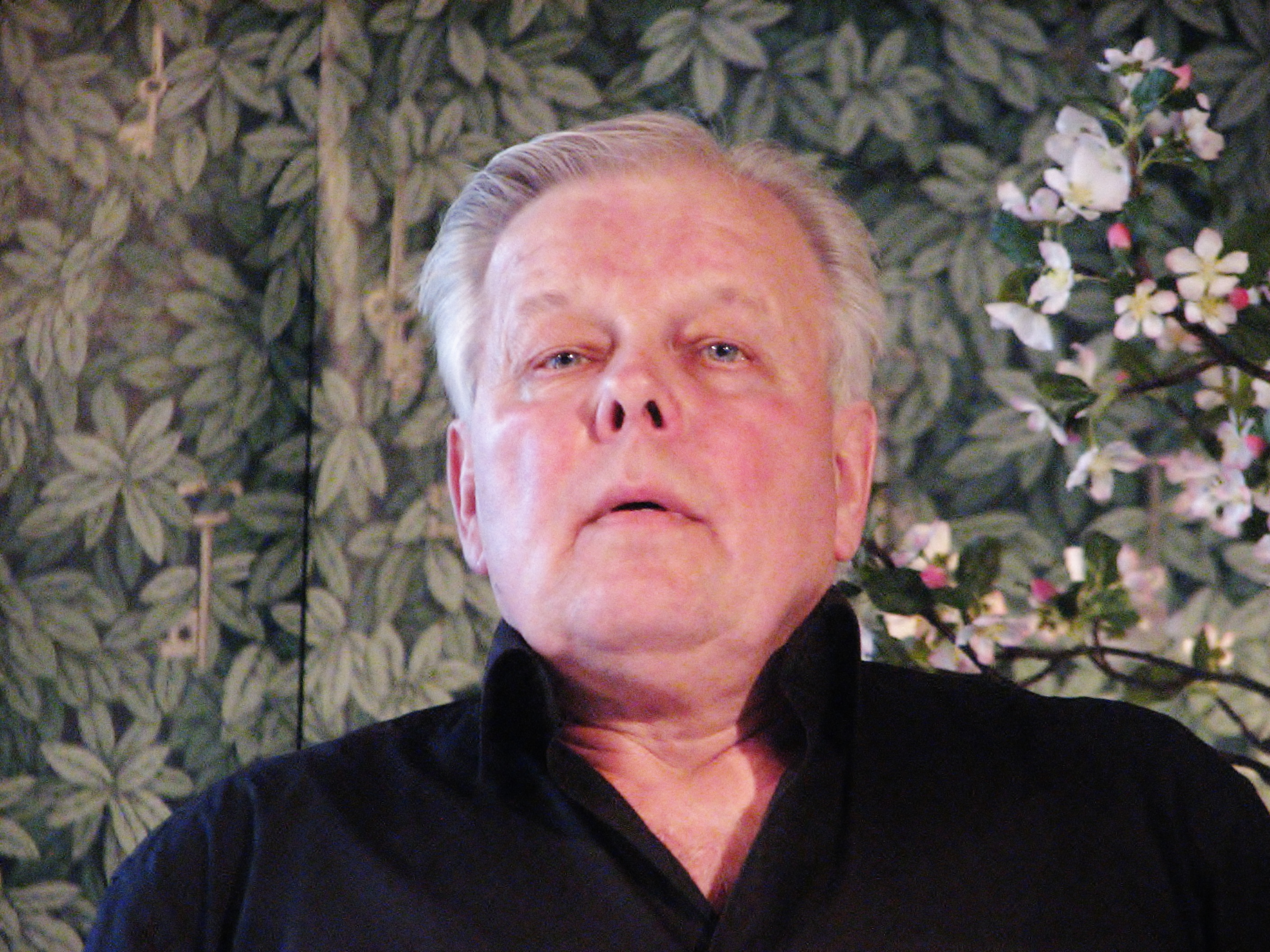 Tõnis Rätsep esinemas HeadReadil Tallinna kirjanike maja musta laega saalis